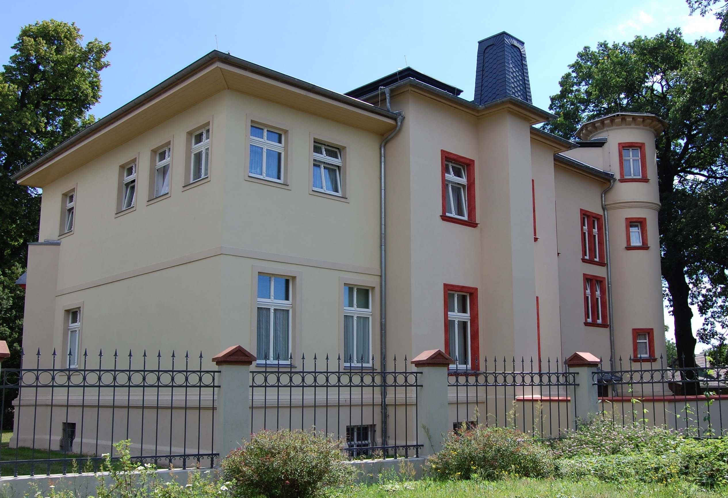 Witwenvilla am Schloss Straupitz